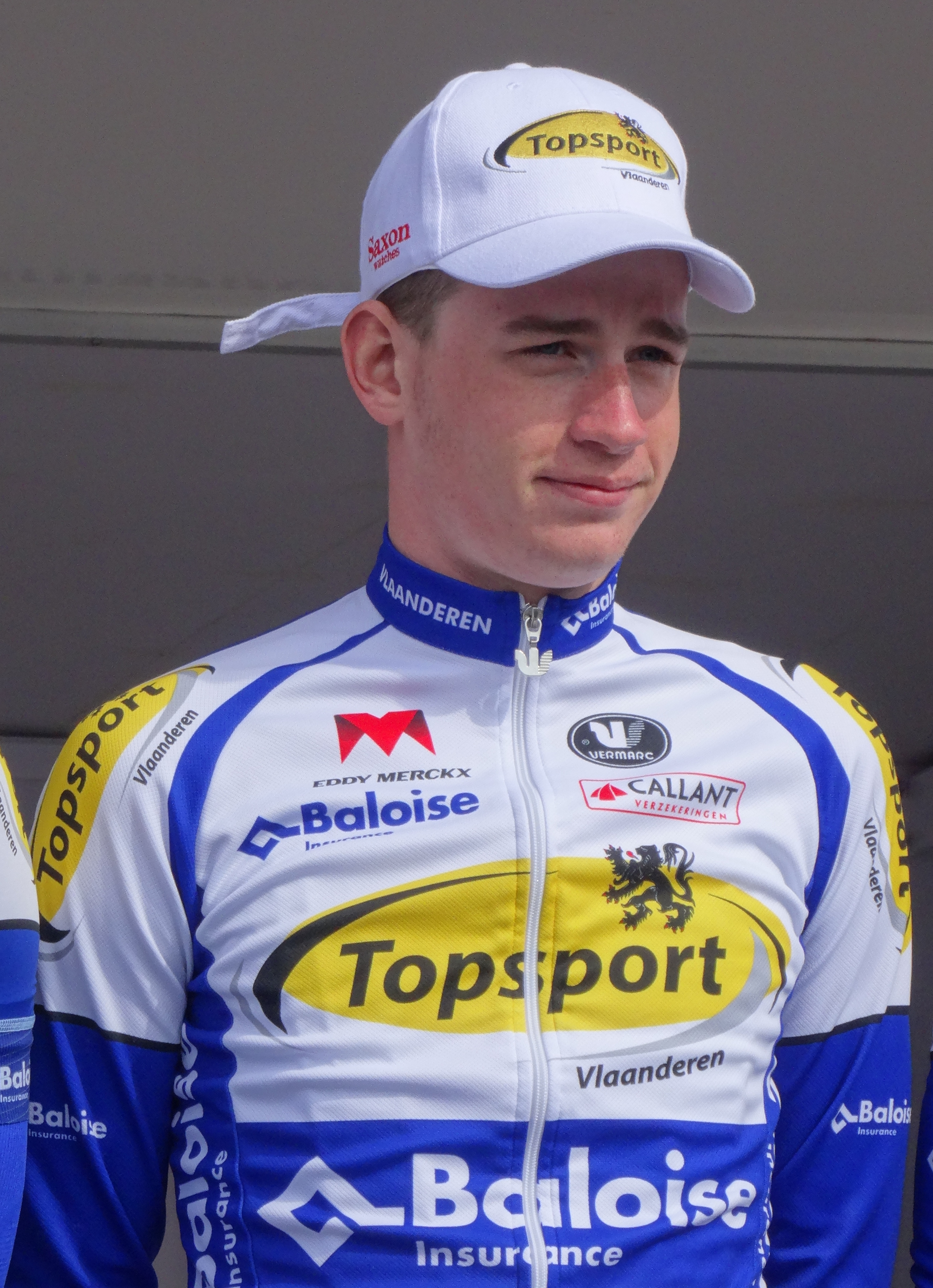 Reportage réalisé le jeudi 17 avril à l'occasion du départ et de l'arrivée du Grand Prix de Denain 2014 à Denain, Nord, Nord-Pas-de-Calais, France.